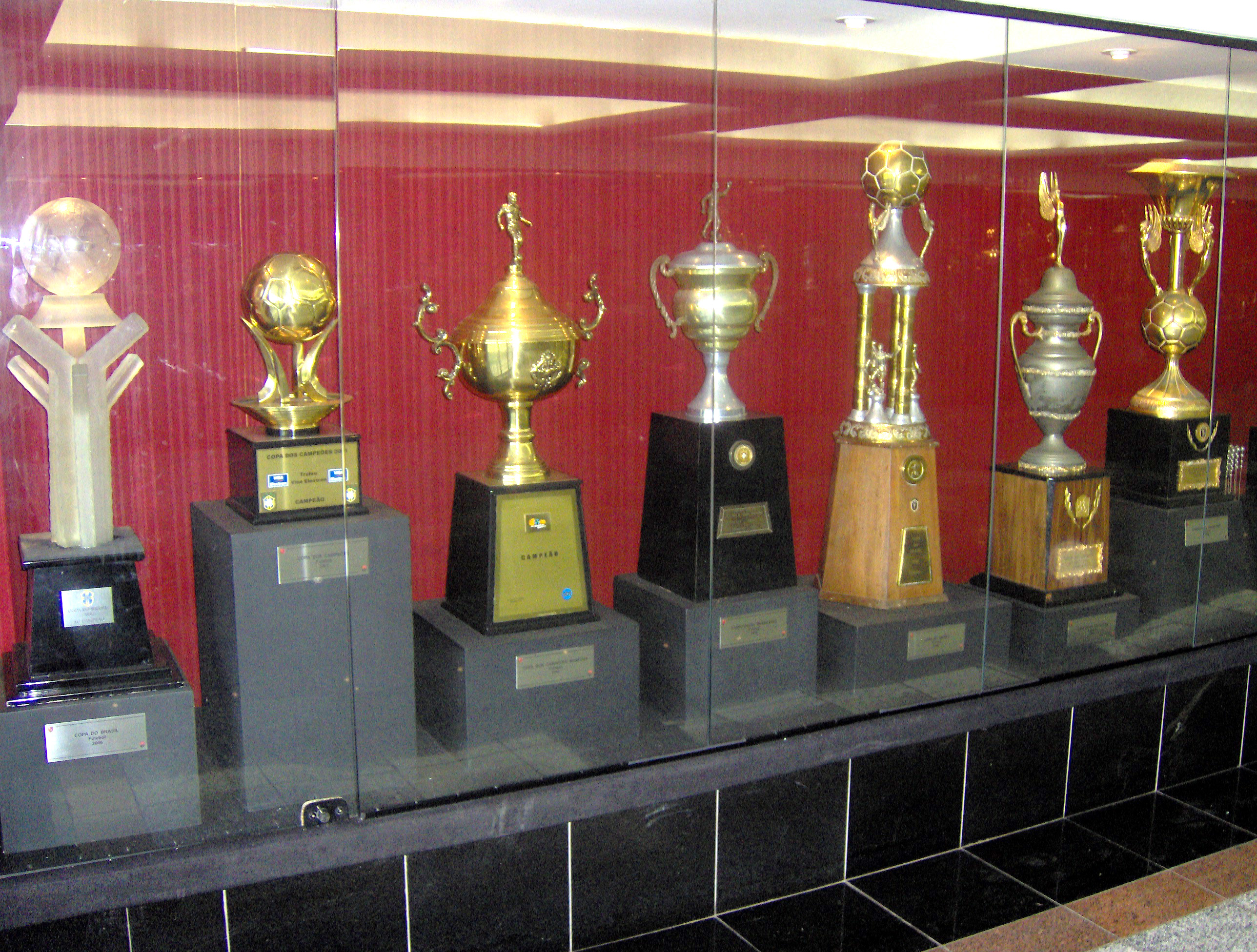 Sala de Troféus do Clube de Regatas do Flamengo, na Gávea, Rio de Janeiro.